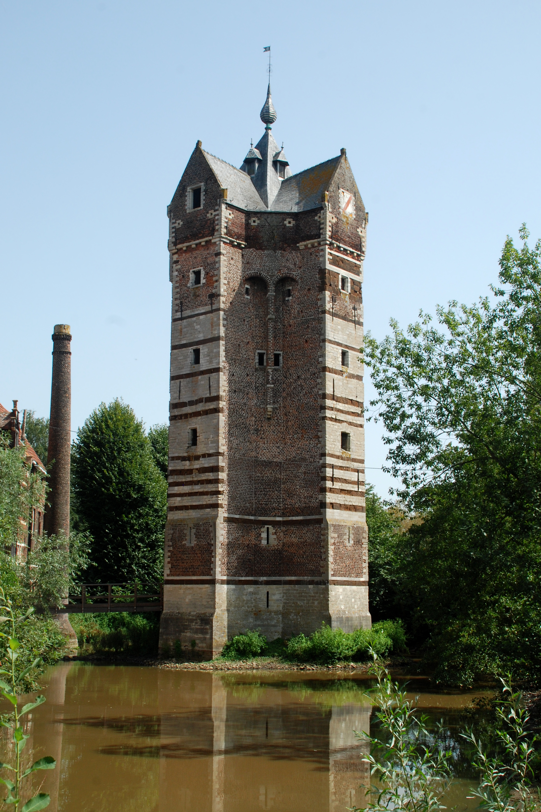 Belgique - Brabant flamand - Rotselaar - Donjon Ter Heiden